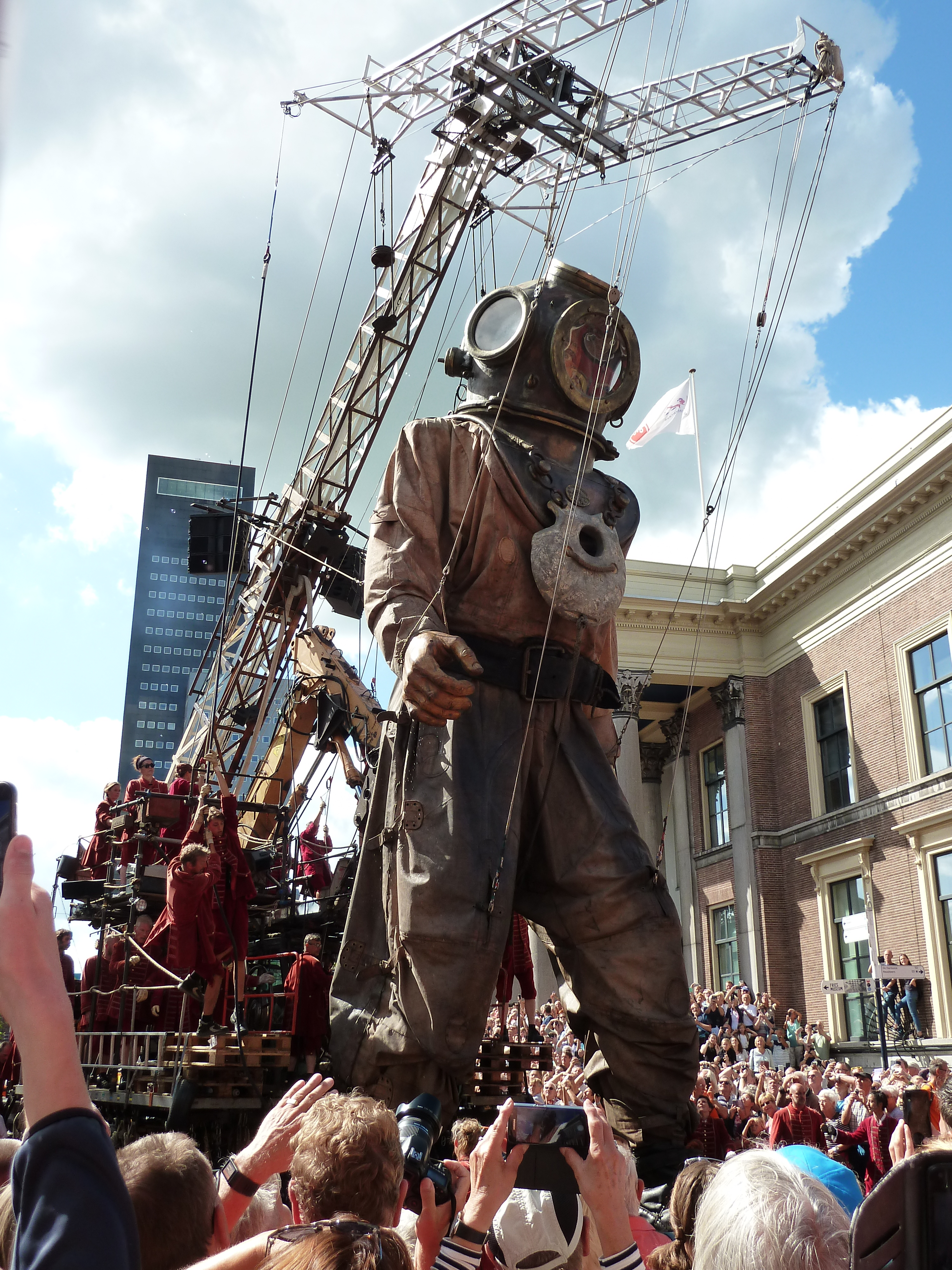 De reuzen van Royal de Luxe bezoeken Leeuwarden in het kader van Leeuwarden, culturele hoofdstad van Europa 2018. De duiker heeft Friesland miljoenen jaren geleden geholpen om zich te beschermen tegen het water. Hij pakte alle bergen in Friesland op en wierp deze als dijken lang het water neer. De duiker is de vader van het kleine reuzenmeisje.